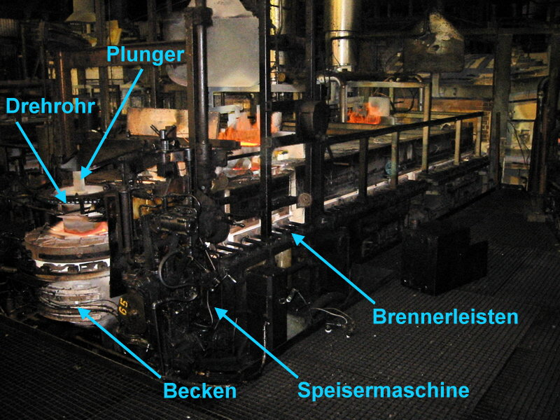 Feeder mit Beschreibung einzelner Teile